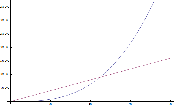 cubic vs linear